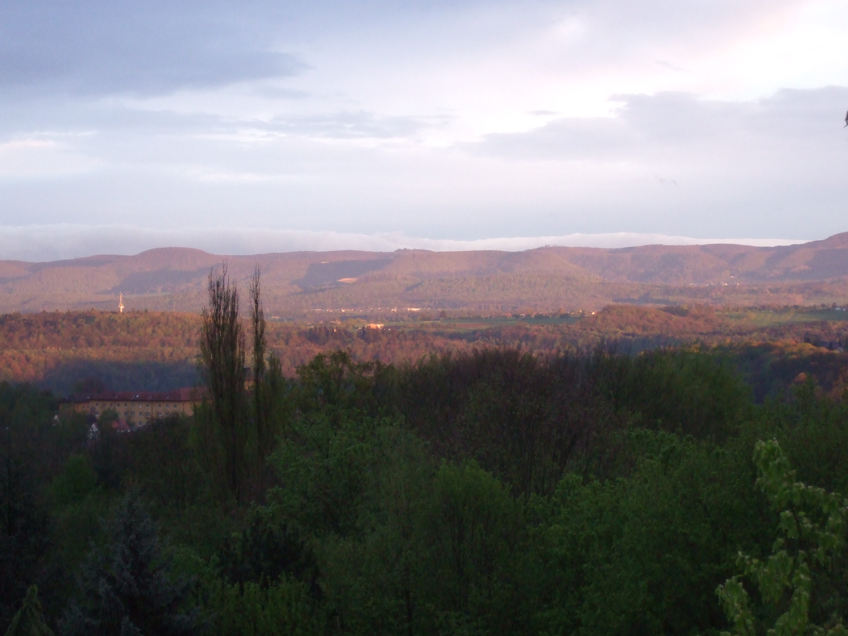 Albtrauf in der Abendsonne, von Tübingen aus gesehen.